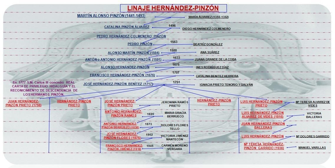 Arbol genealógico de Linaje Hernández-Pinzón.